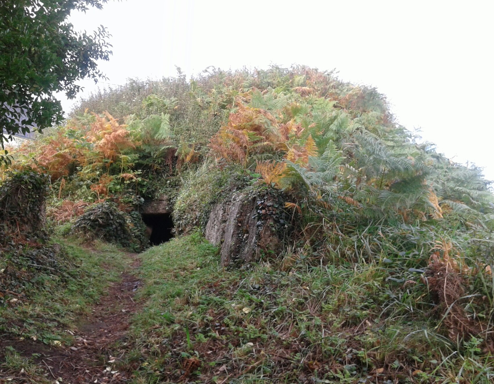 Tumulus de Poulguen à Penmarc'h - entrée